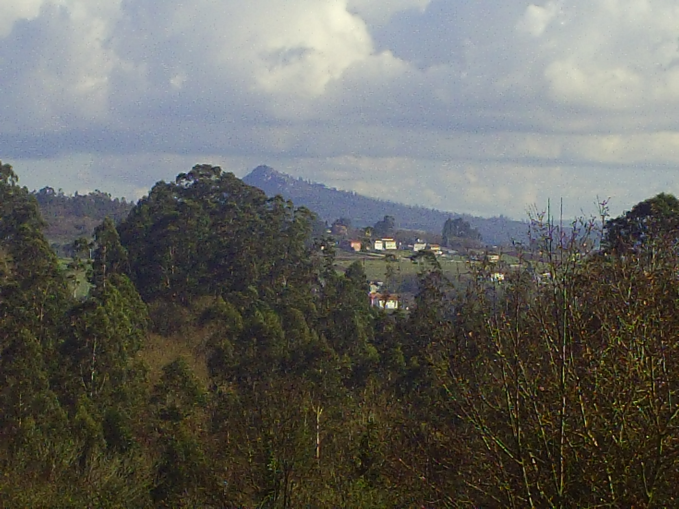 Angrois, vistas desde O Castro con el Pico Sacro al fondo